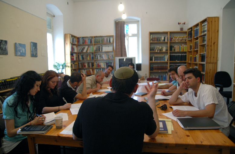 לימוד בבית המדרש קולות